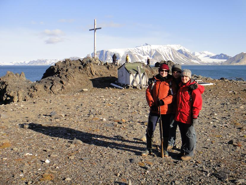 Pracownicy Katedry Chemii Analitycznej Wydziału Chemicznego Politechniki Gdańskiej w czasie pobytu na Spitsbergenie